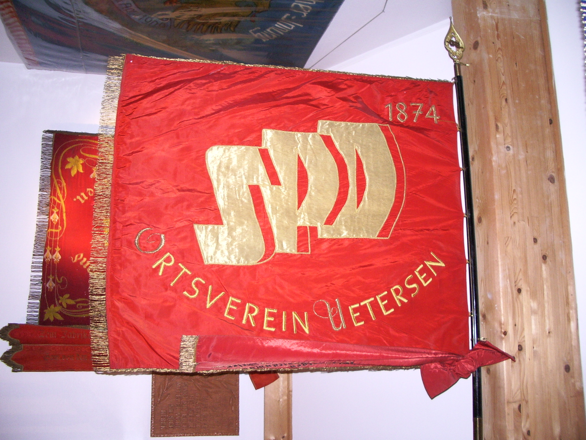 Banner des SPD Ortsverein Uetersen. Gründungsjahr 1874